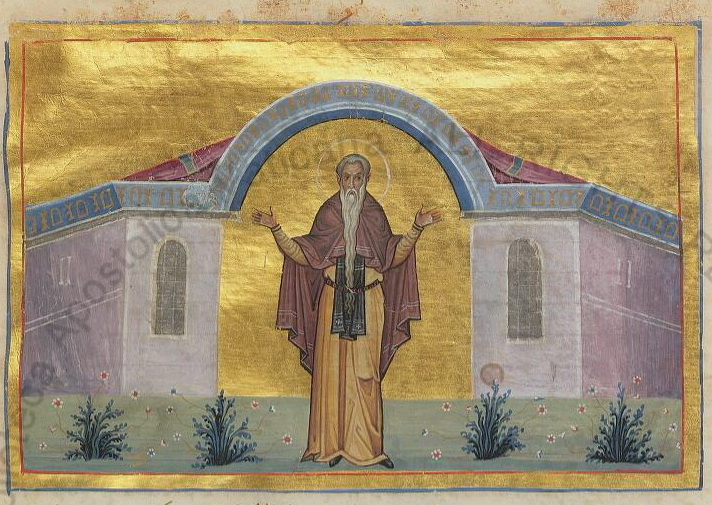 ЕВФИМИЙ ВЕЛИКИЙ Константинополь. 985 г. Миниатюра Минология Василия II. Ватиканская библиотека. Рим.